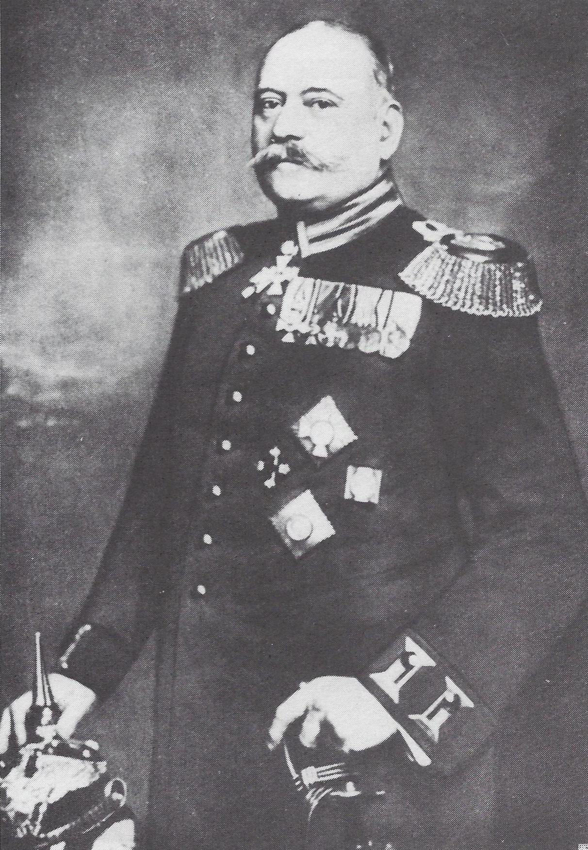 Fotografie von Generalstabsarzt Otto von Schjerning (1853–1920).